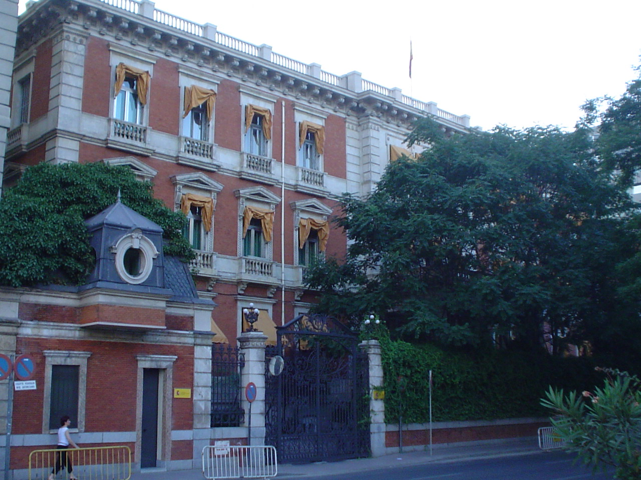 Antigua residencia del presidente del gobierno en Madrid.